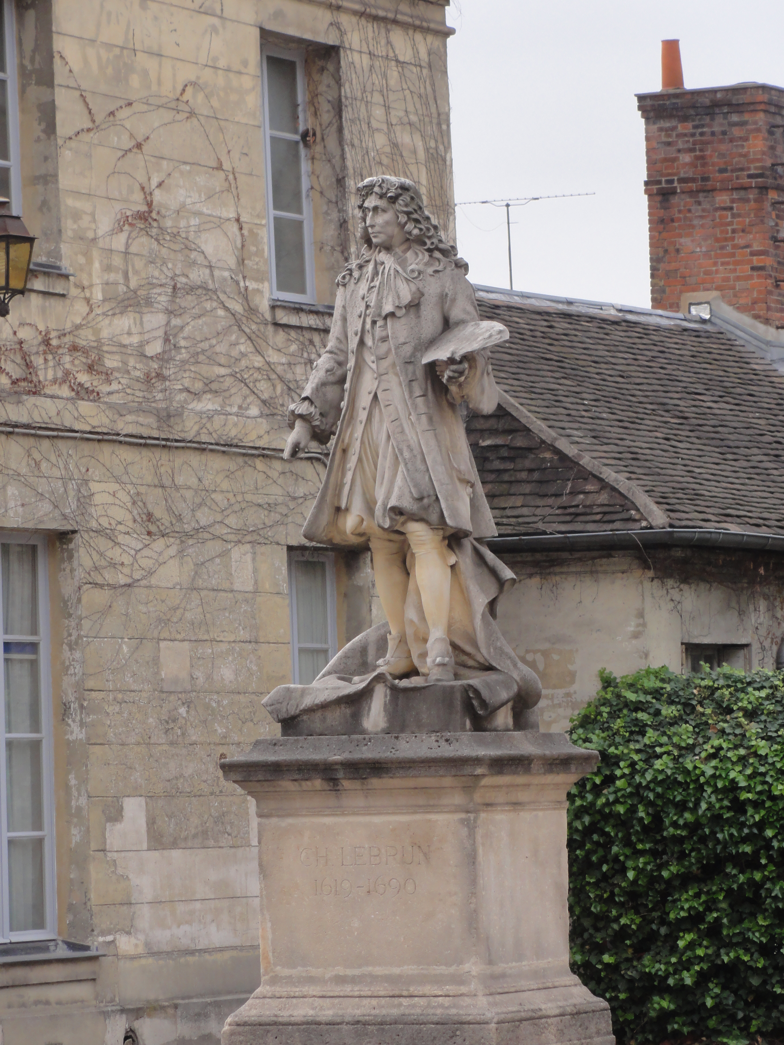 Henri-Louis Cordier (Français, 1853-1926) : Monument à Charles Le Brun, 1907, marbre, statue en pied, cour d'Antin de la Manufacture des Gobelins, XIIIe arrondissement, Paris, France.